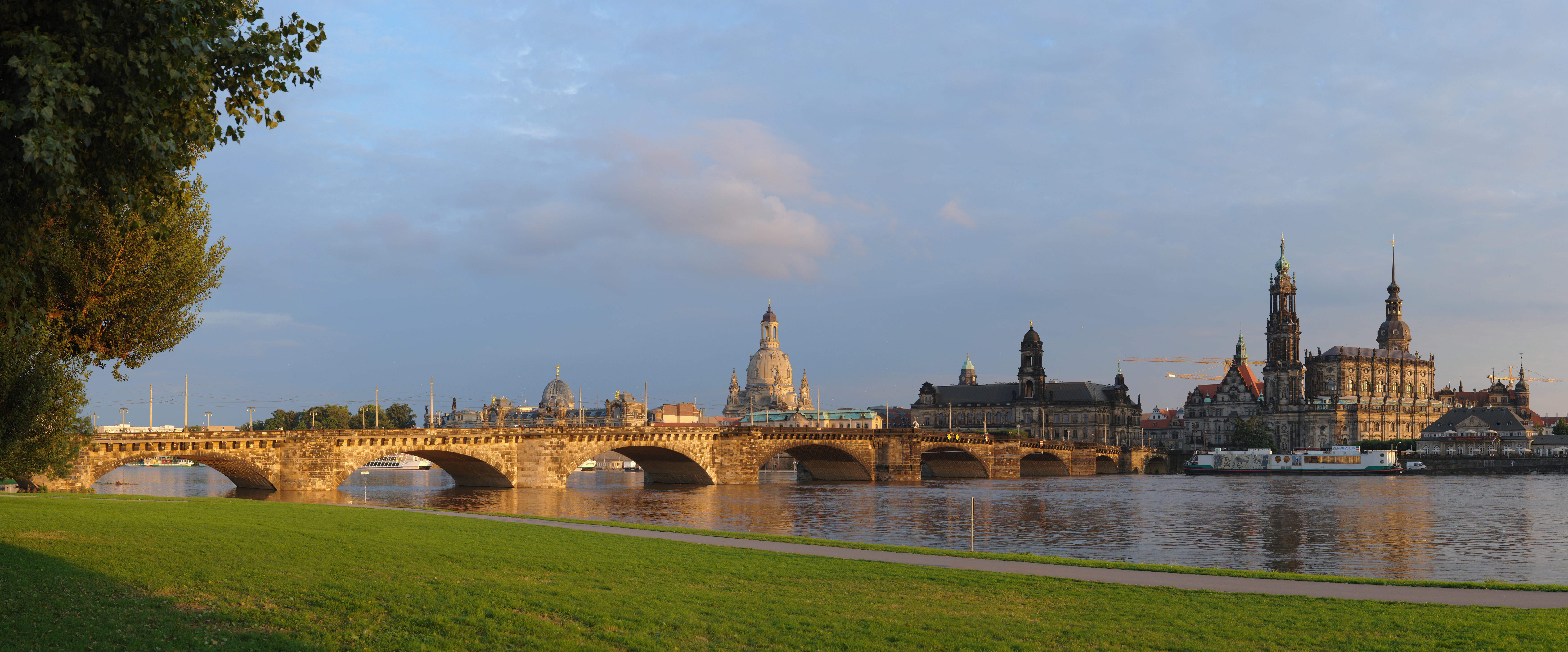 Augustusbrücke Dresden (sogenannter Canaletto-Blick) bei erhöhtem Pegelstand der Elbe.